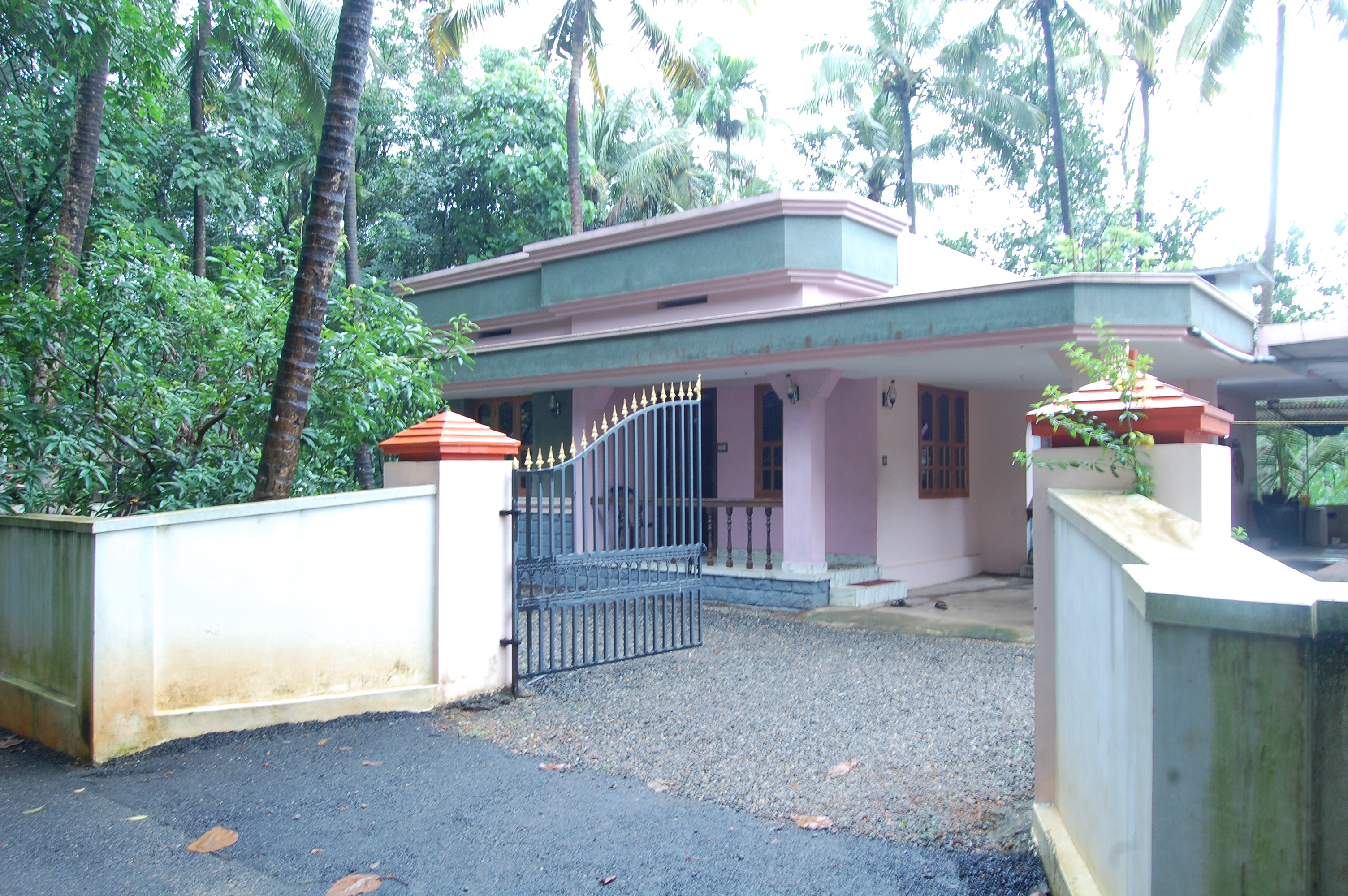 കേരളത്തിലെ ഒരു ഇടത്തരം വീട്